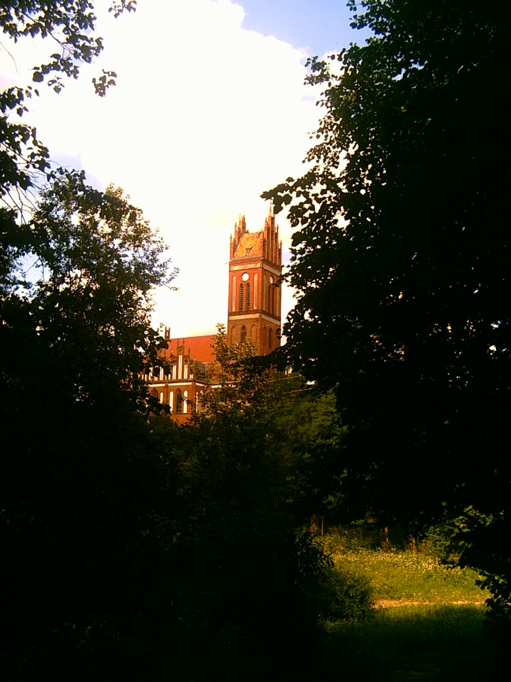 Kościół pw św. Piotra i Pawła z XIV wieku w Pieniężnie